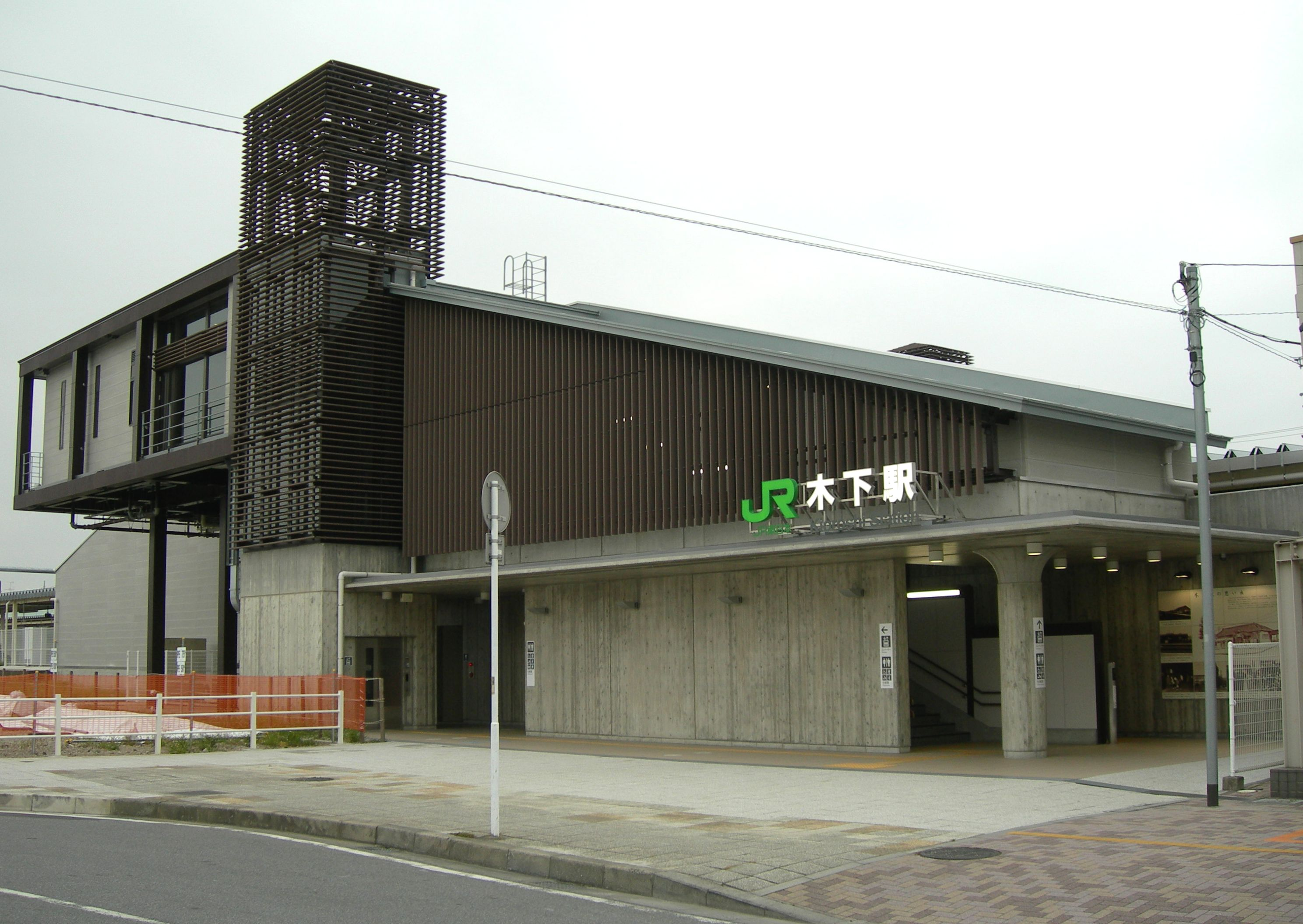 木下駅南口